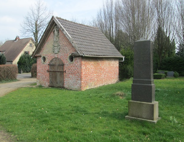 Kapelle von 1692 auf dem Reformierten (Niederländischen) Friedhof in Glückstadt / Holstein